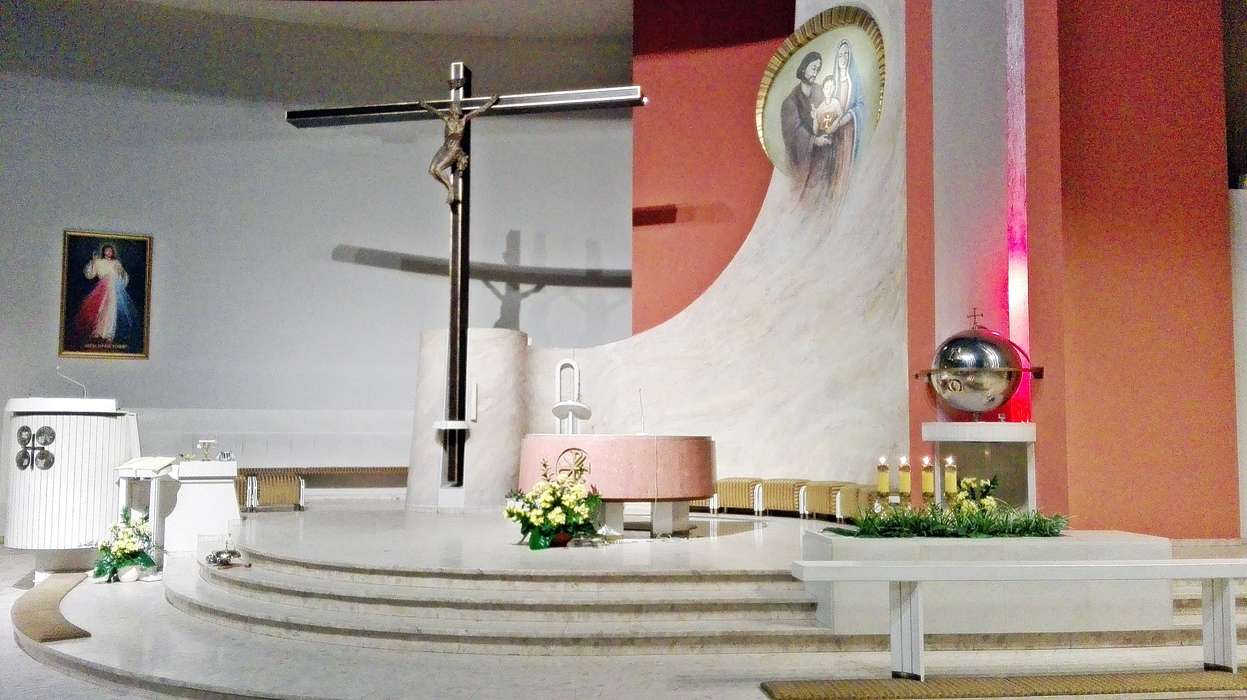 Wnętrze